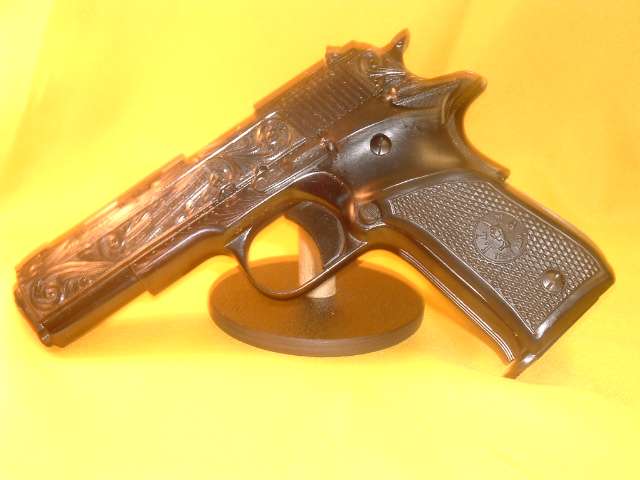 photo: gnafron (archive colleccion)